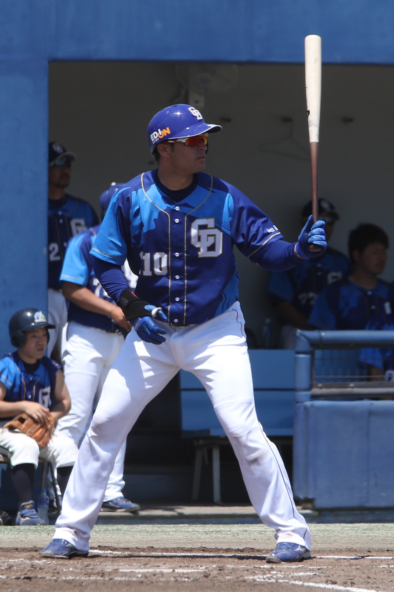 2019年5月25日、ナゴヤ球場にて